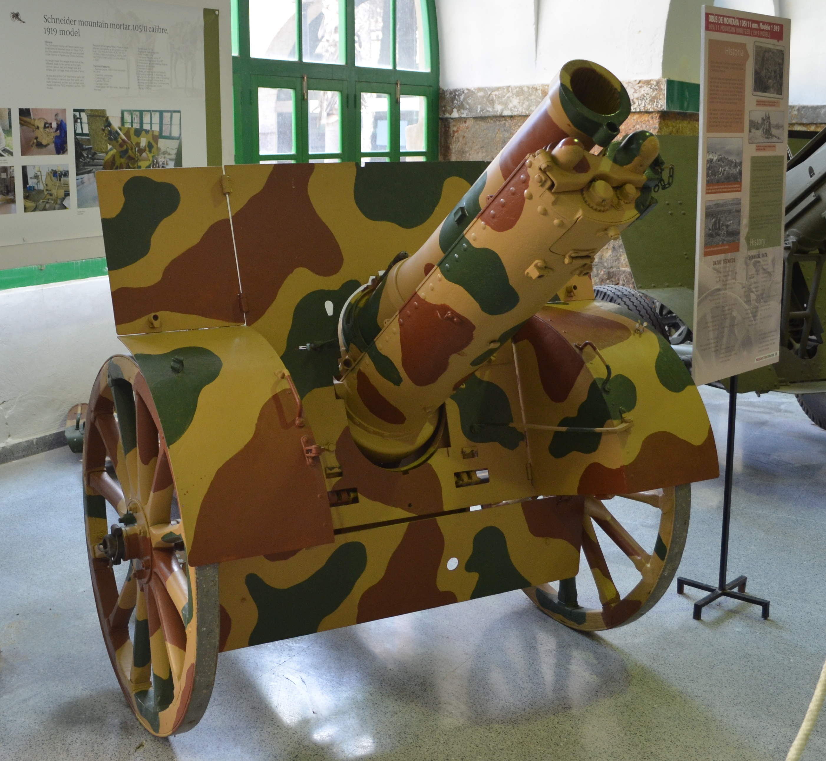 Obús Schneider de montaña 105/11 mod. 1919